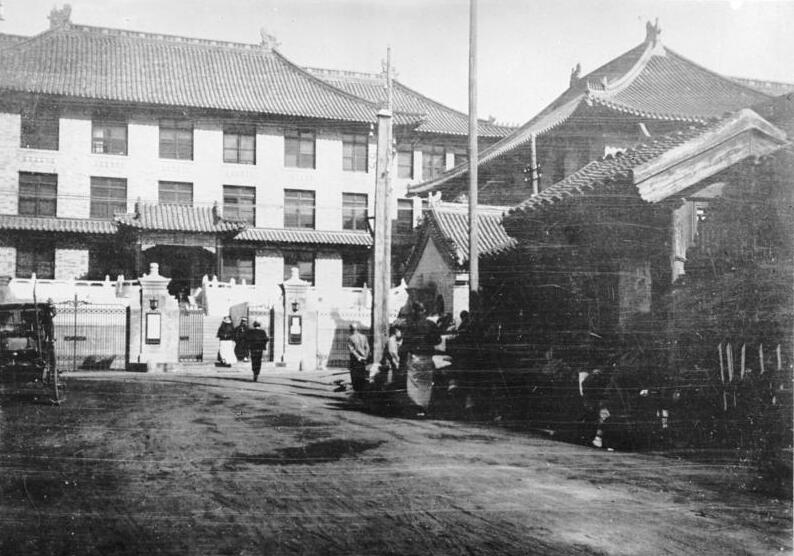 China, Peking, Rodfeller Hospital